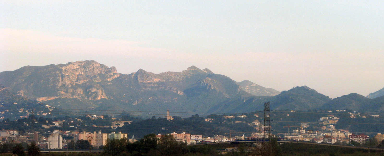 Imagen panorámica de Alcira.